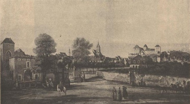 Beiträge zur Sächs. Volks- und Heimatkunde. Mit Zeichnungen von Professor O. Seyffert und Maler F. Rowland.